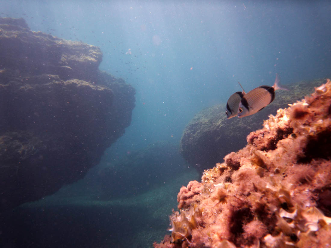 Diplodus vulgaris en Cabo de Palos (Cartagena, Spain)